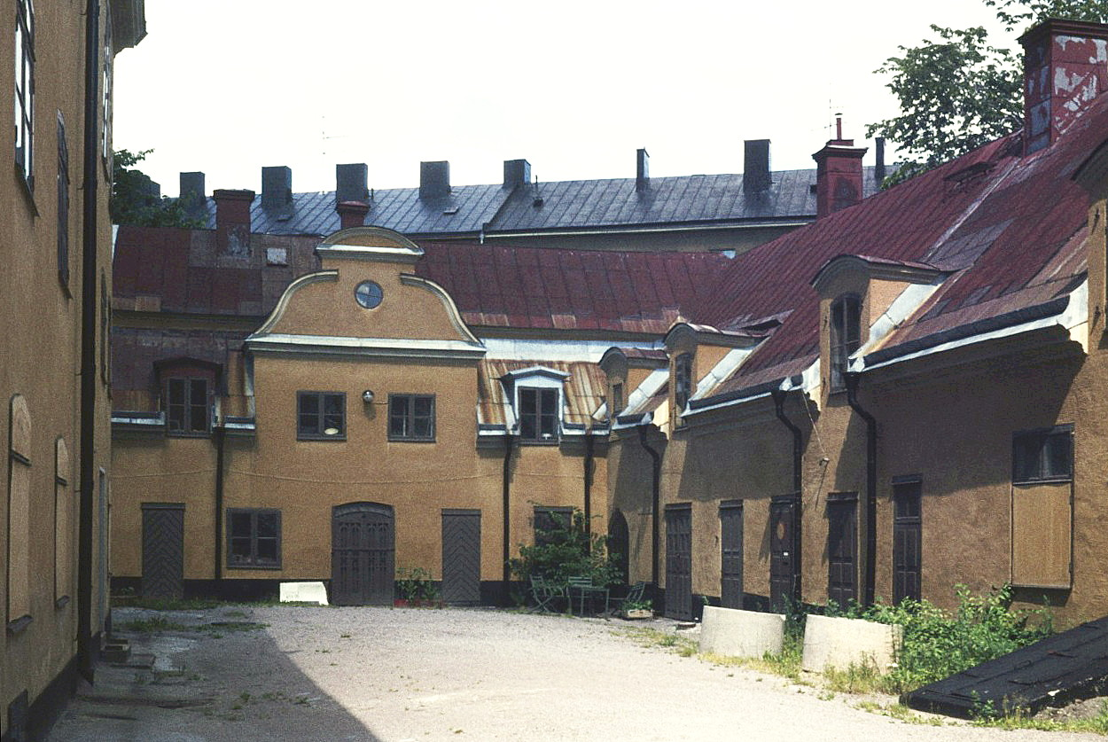 Kvarteret Tegen, innergården mot norr